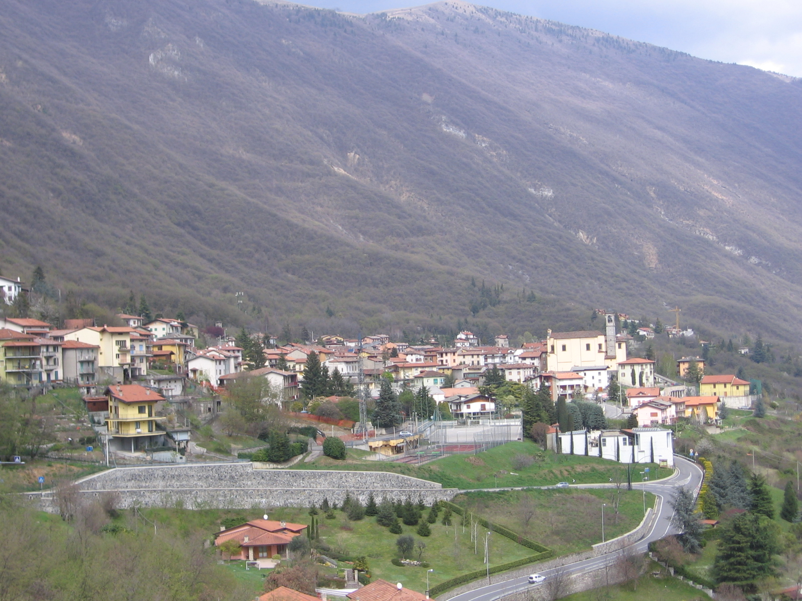 Ranzanico, Bergamo, Italia